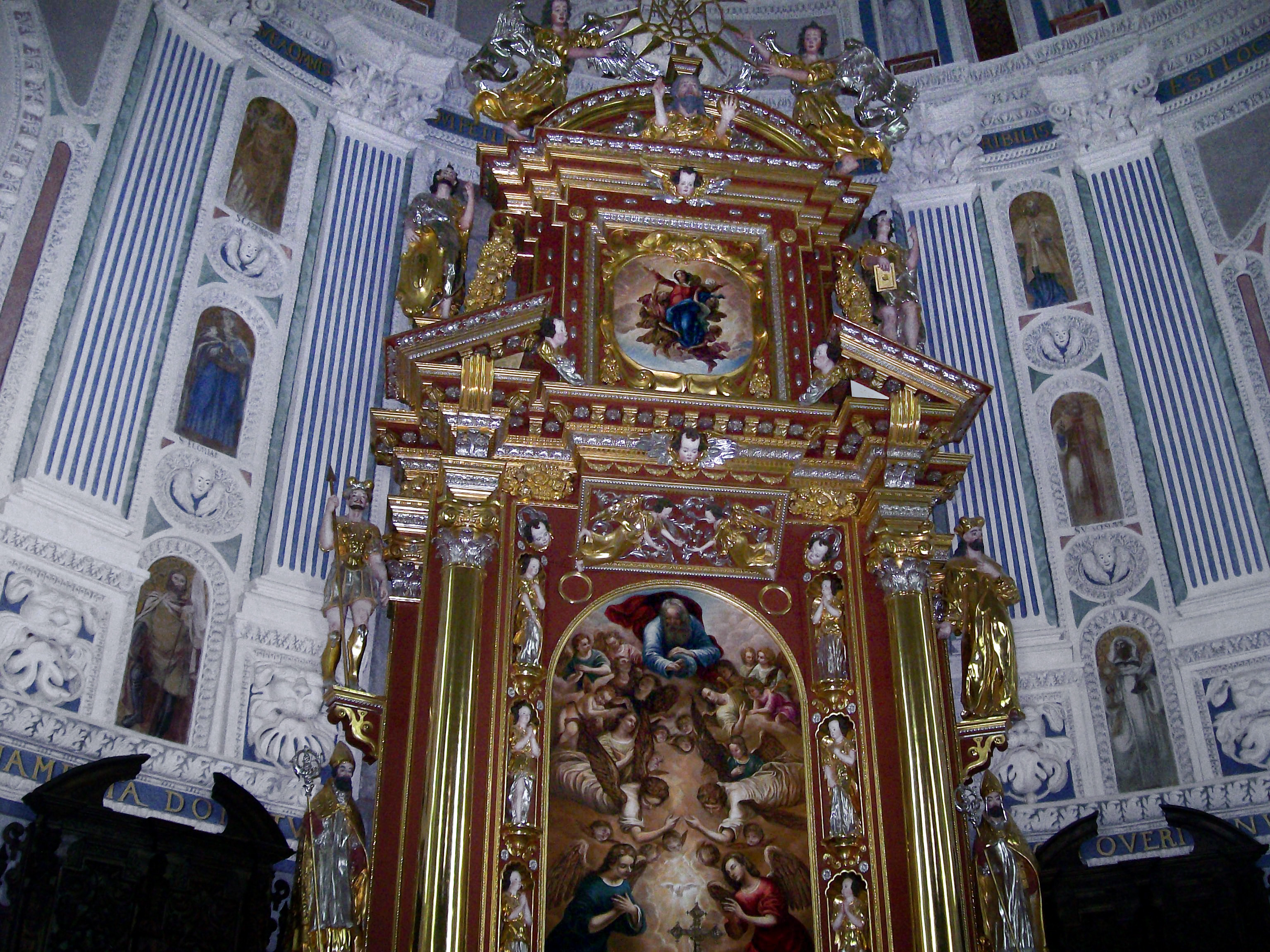 Zamek w Krasiczynie.